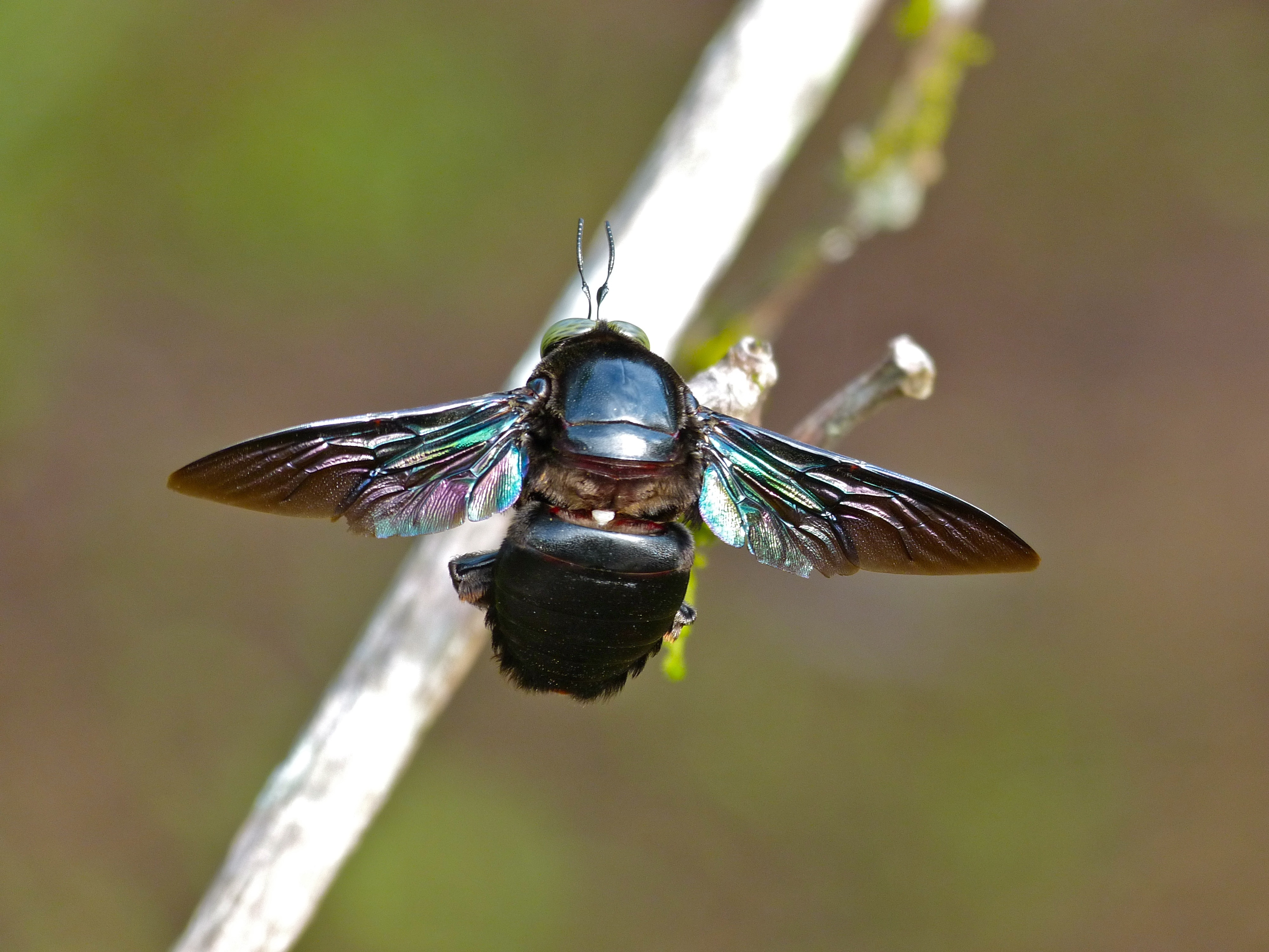 Bilit, Sabah, MALAYSIA